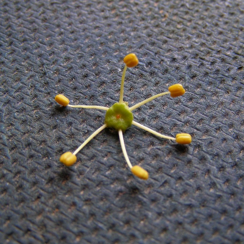 Männliche Einzelblüte eines Johannisbrotbaumes